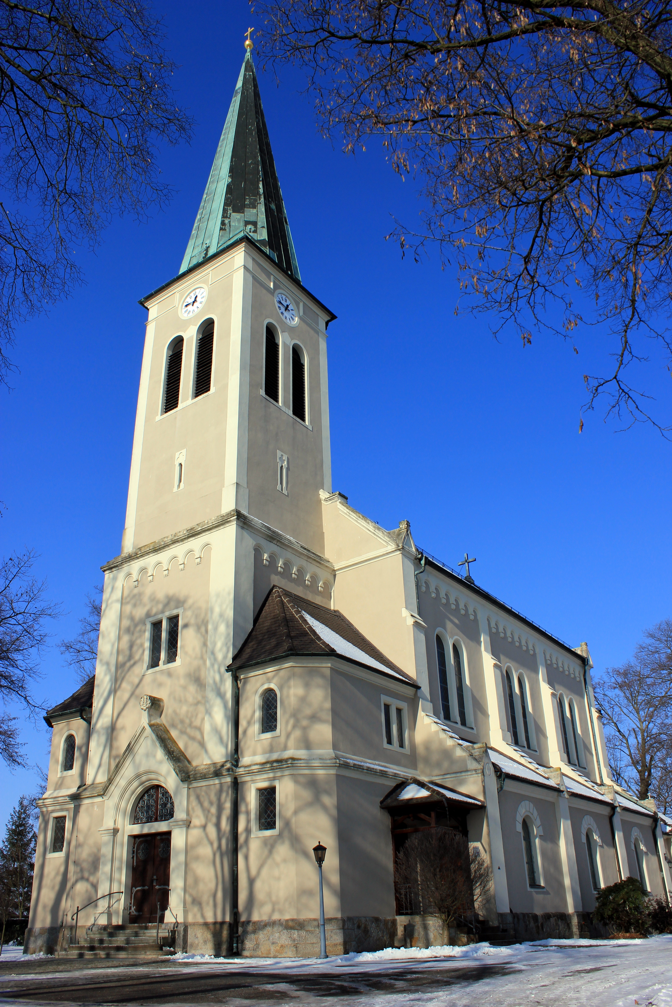 Hornjoserbsce: Ewangelska cyrkej w Chwaćicach.